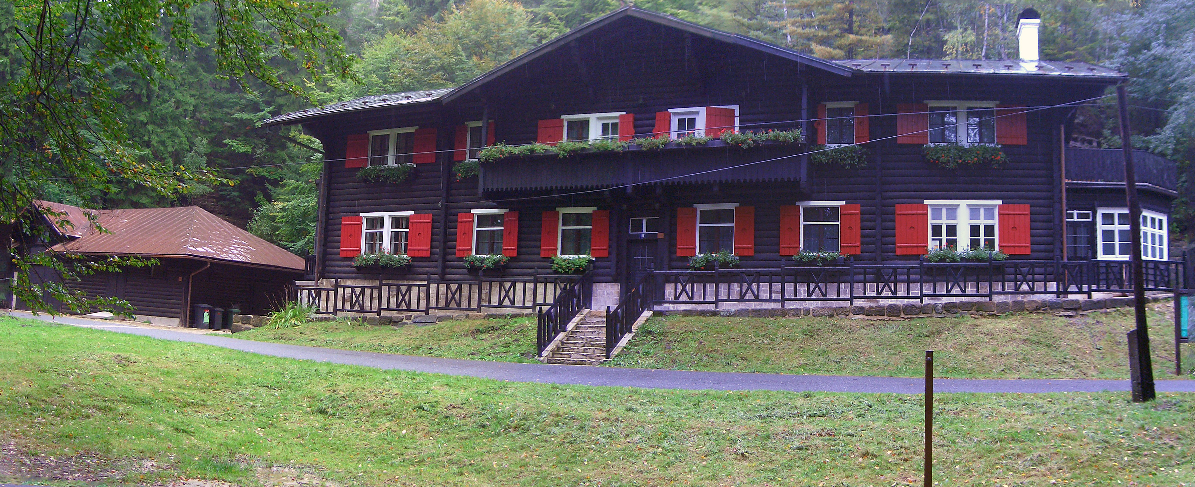 An den Balzhütten (Tokáň, Chatá na Tokáni) bei Jetřichovice (Dittersbach)